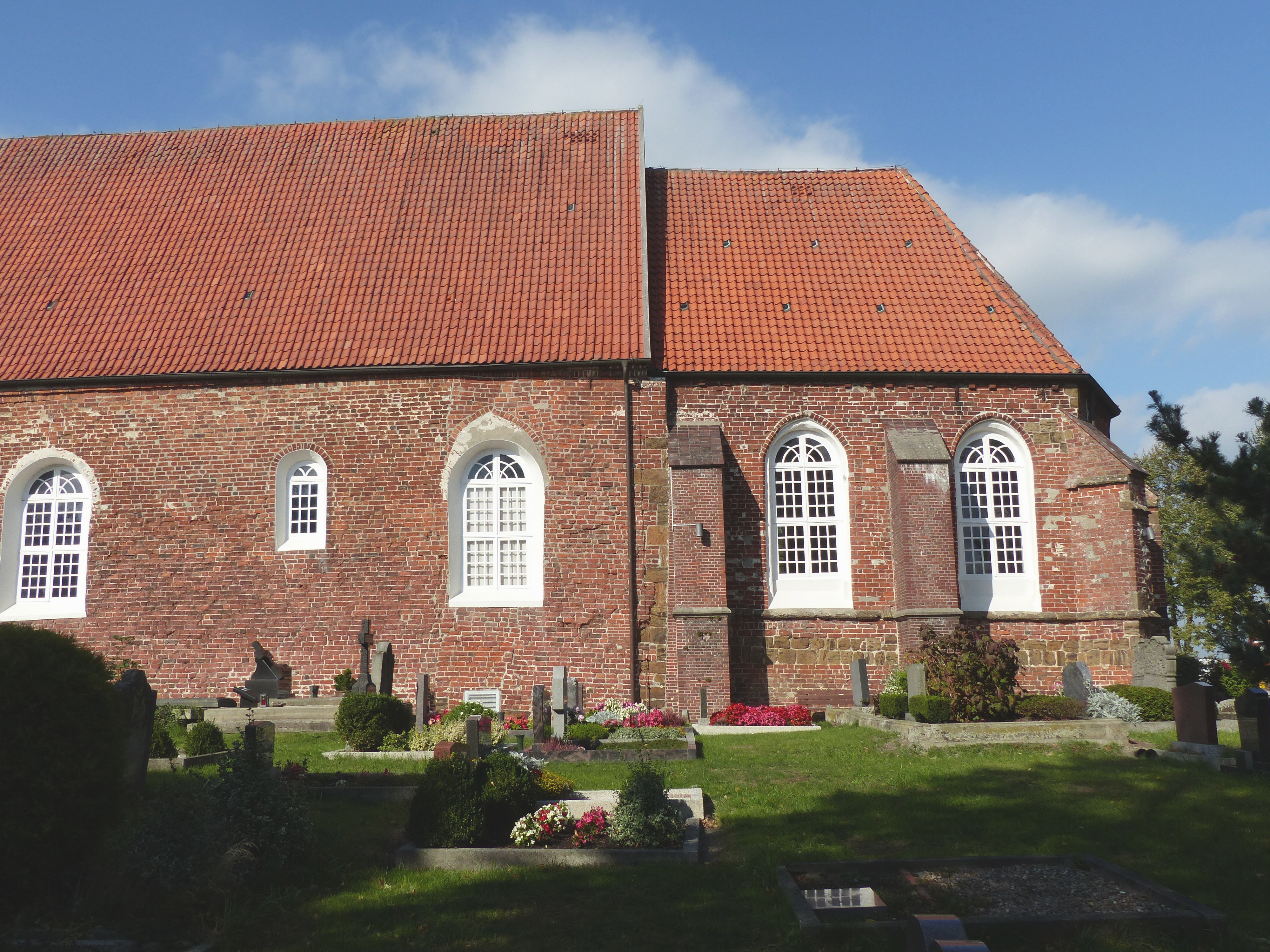 Dorfkirche Golzwarden, Chor und östliche Hälfte des Schiffs von Süden